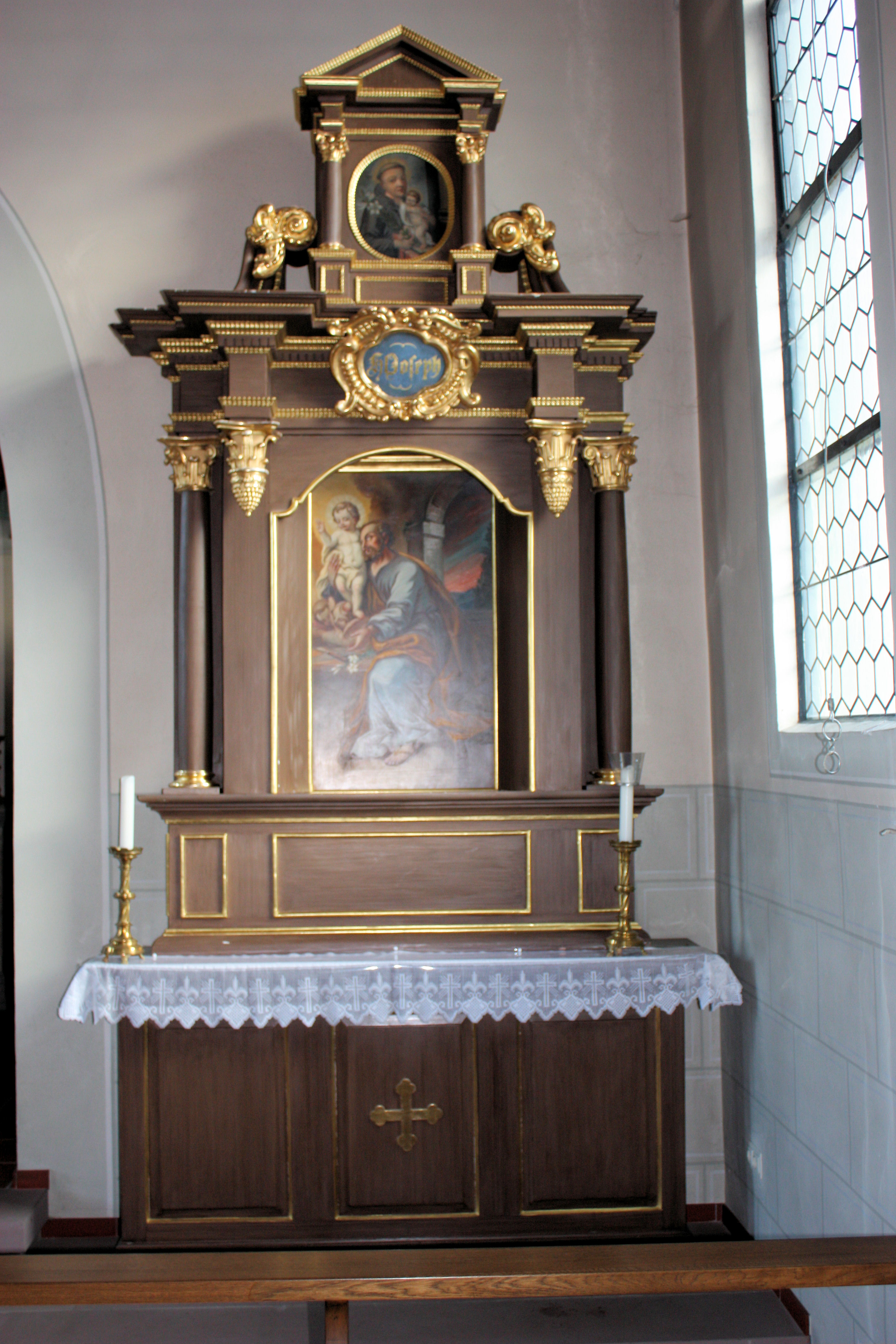 Der Josefsaltar, ein ursprünglicher Statuen- und Freisäulenretabel aus der Dorfkapelle Indlekofen im Landkreis Waldshut, ursprünglich von Johann Christoph Feinlein für St. Pankratius in Eschbach mit dem symmetrischen Marienaltar geschaffen. Erhebliche, zum Teil entstellende Umarbeiten und Neufassung mit brauner Farbe durch den Kunstmaler Bertsche aus Waldshut 1941, der auch die Altarblätter kreierte.